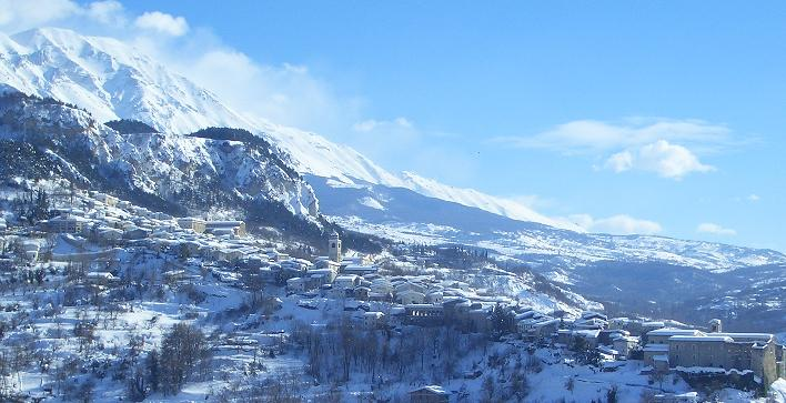 Caramanico Terme: panorama del paese innevato